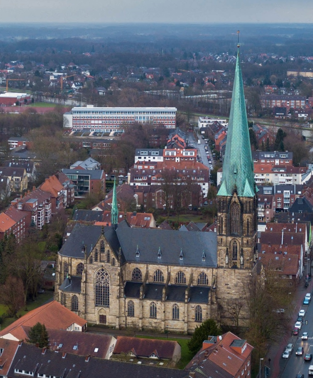 Münster, Herz-Jesu-Kirche, Luftaufnahme